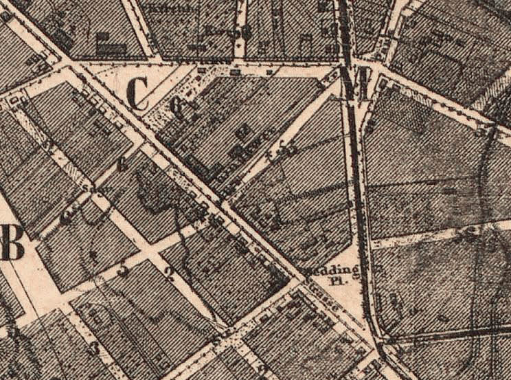 Der Titel steht unter der Karte zusammen mit einem Maßstab über 500 Ruthen. Über dem Plan steht noch der alte Titel der Vorgängerkarte von Boehm (die Kartenserie "Plan von Berlin und Umgegend bis Charlottenburg" beginnt 1852). Die 14 Abteilungen des Hobrecht-Plans sind als römische Ziffern beschriftet. Geplante Plätze sind mittels Großbuchstaben und Straßen mittels arabischer Ziffern jeweils innerhalb einer Planabteilung beschriftet. Die Maßstabsangabe in der Karte (1:15584) ist offenbar von der Vorgängerkarte falsch abgeschrieben worden.